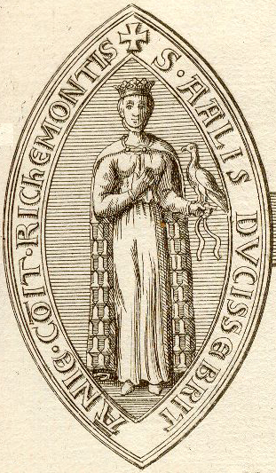 Sceau d'Alix, duchesse de Bretagne